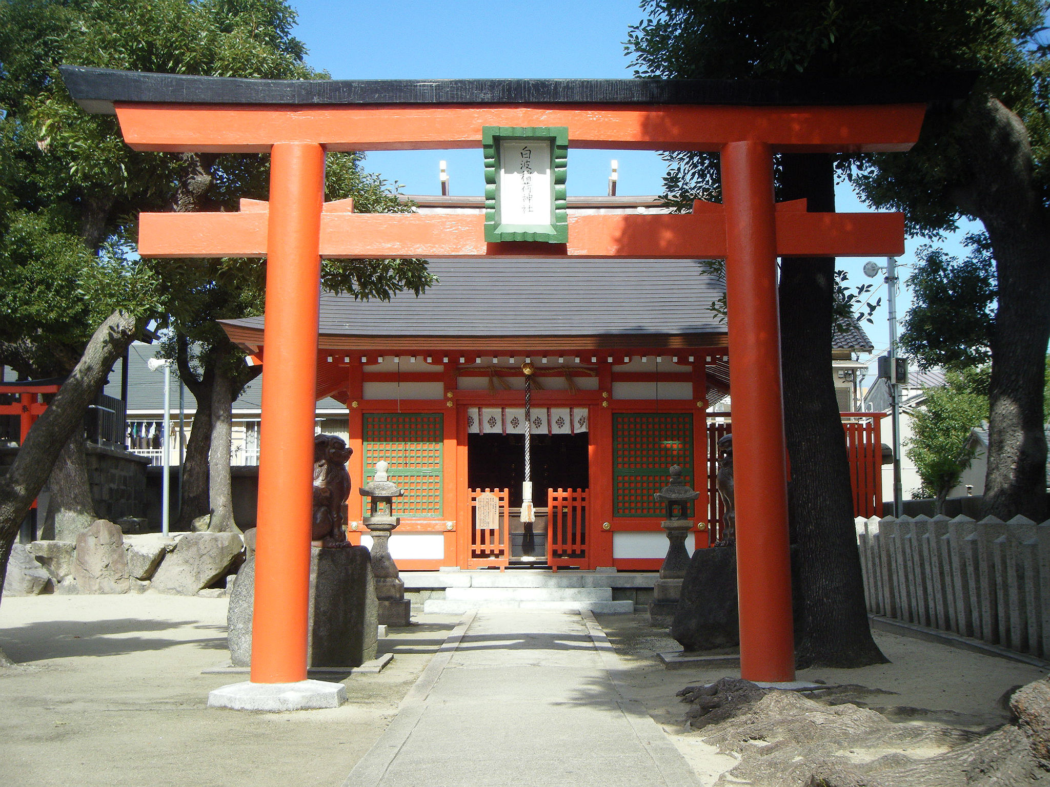 尼崎・貴布禰神社 白波稲荷神社